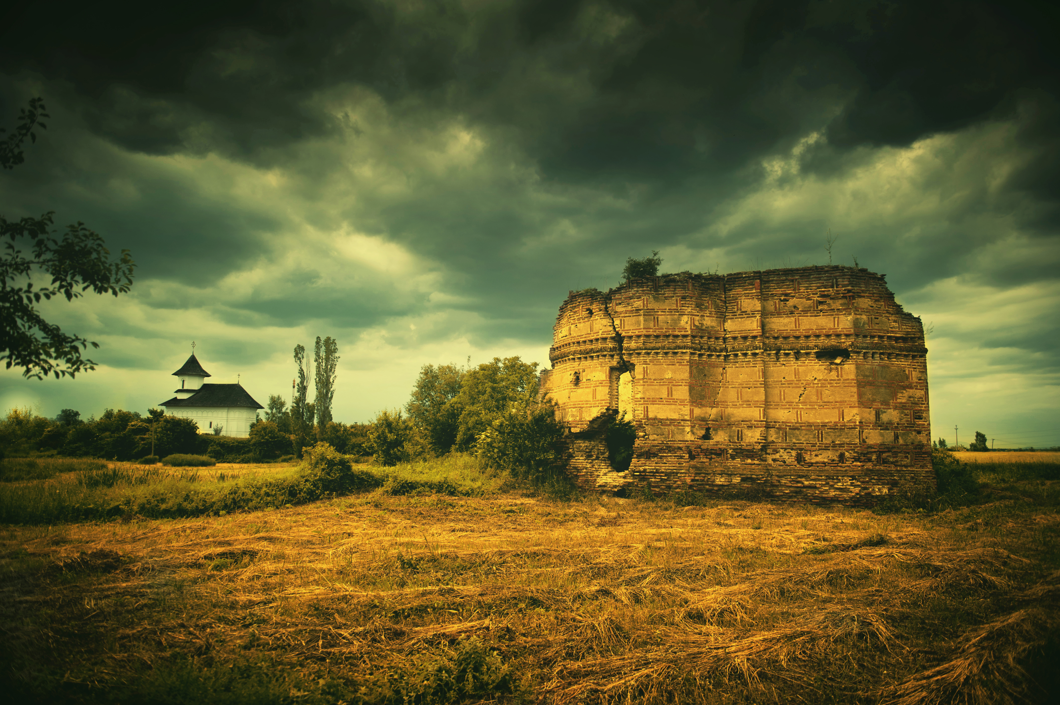 Târgșoru Vechi (în trecut, Târgșor și Târgșoru este o localitate din comuna cu același nume din județul Prahova, Muntenia, România. Pe locul satului Târgșoru Vechi s-a aflat în evul mediu orașul Târgșor, din care s-au mai păstrat doar ruinele a trei biserici. Satul se află astăzi la cca. 3 km. de Ploiești. În situl arheologic Târgșor se găsesc următoarele monumente istorice; Biserica "Sf. Pantelimon" a Mănăstiri Turnu a lui Antonie Vodă 1669 - 1672, reconstruită pe ruine 1997-2001 Ruinele bisericii Albe (1570)